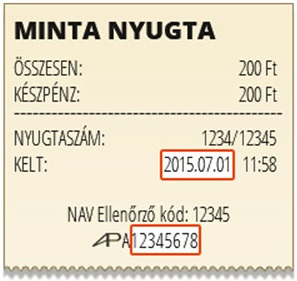 Magyarországi online pénztárgéppel által kiállított mintanyugta. Tartalmazza az legfontosabb elemeit (Összeg, dátum, AP jel és AP kód)